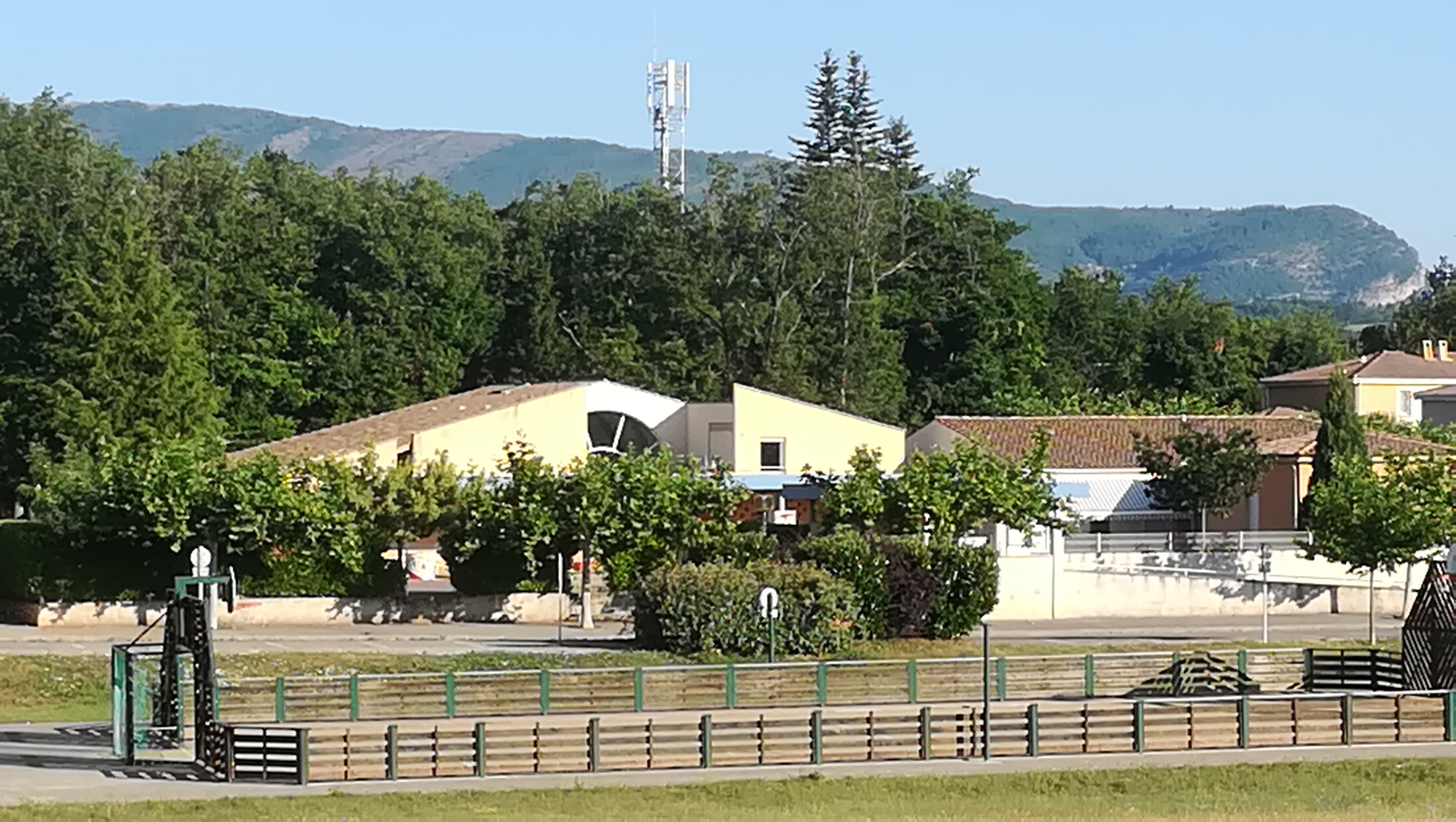 école primaire de la commune de Mison les Armands 04200 .